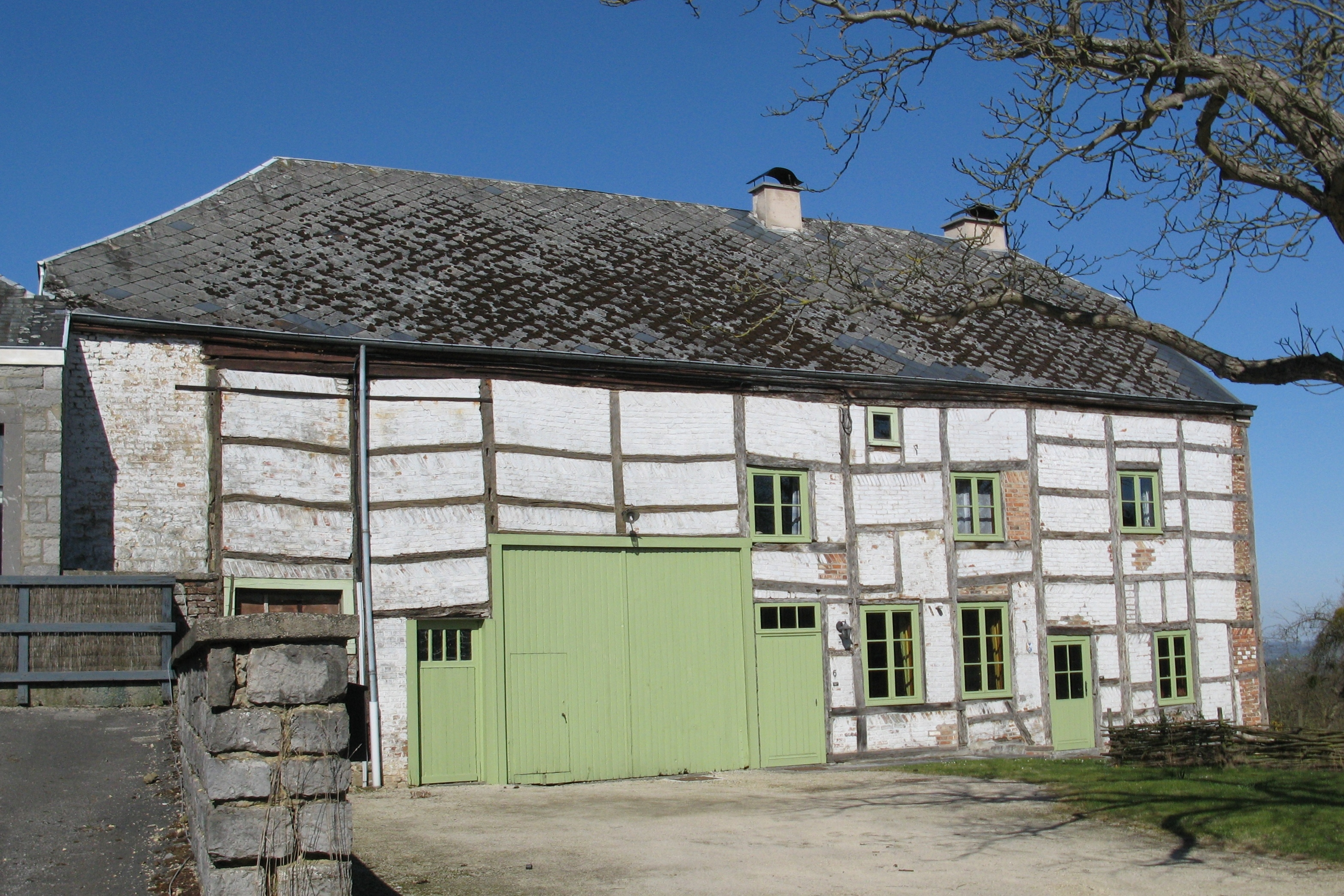 La ferme Moureau à Waha (XVIIe siècle)